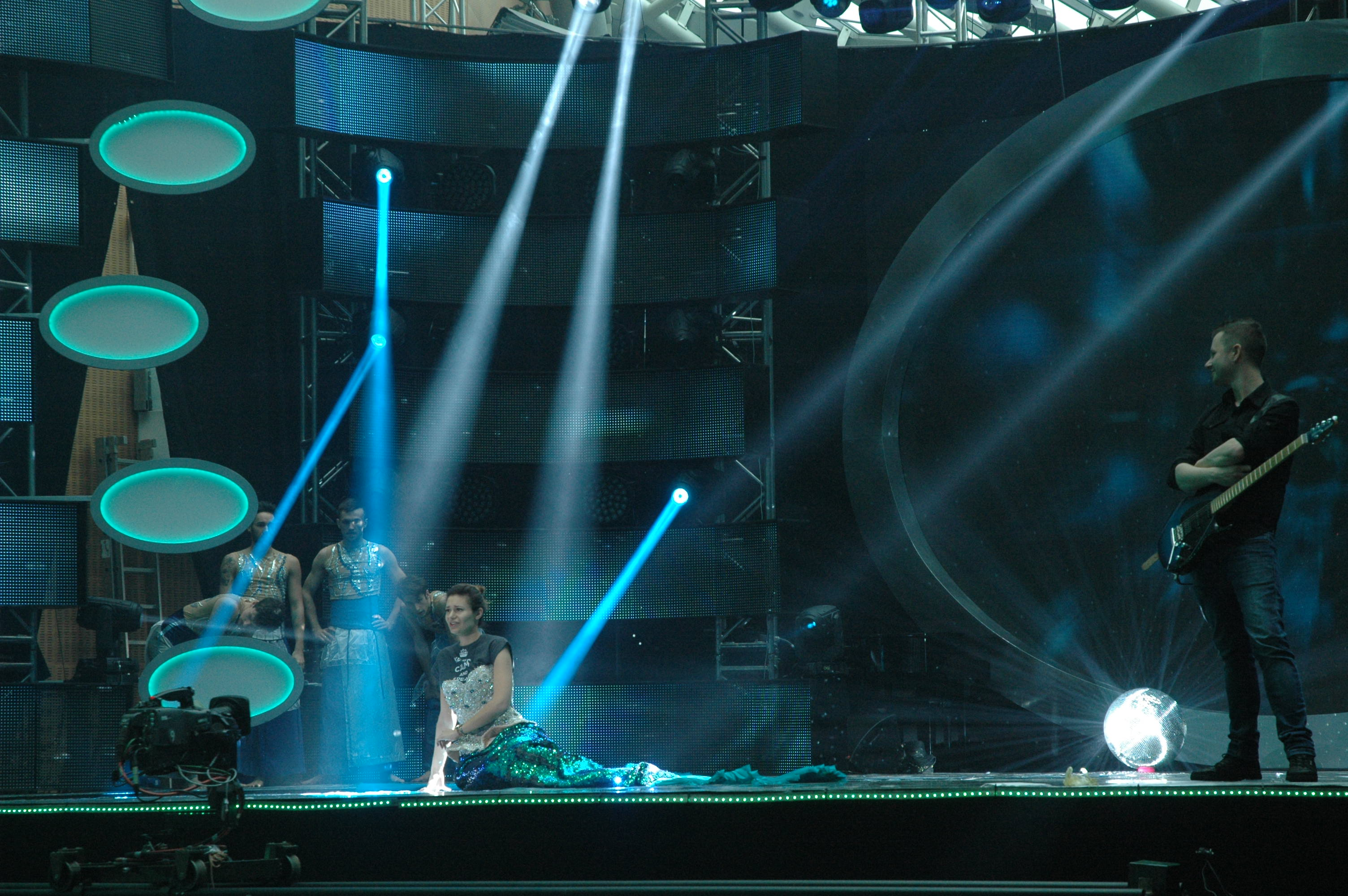 Ola Gintrowska podczas prób do występu w Krajowych Eliminacjach do Konkursu Piosenki Eurowizji 2016.